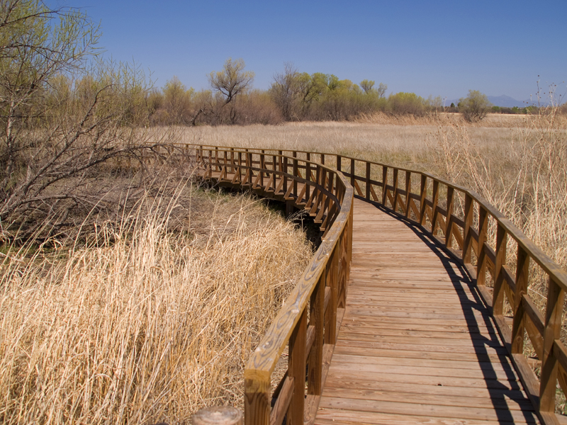 Boardwalk, Arivaca Creek wetlands